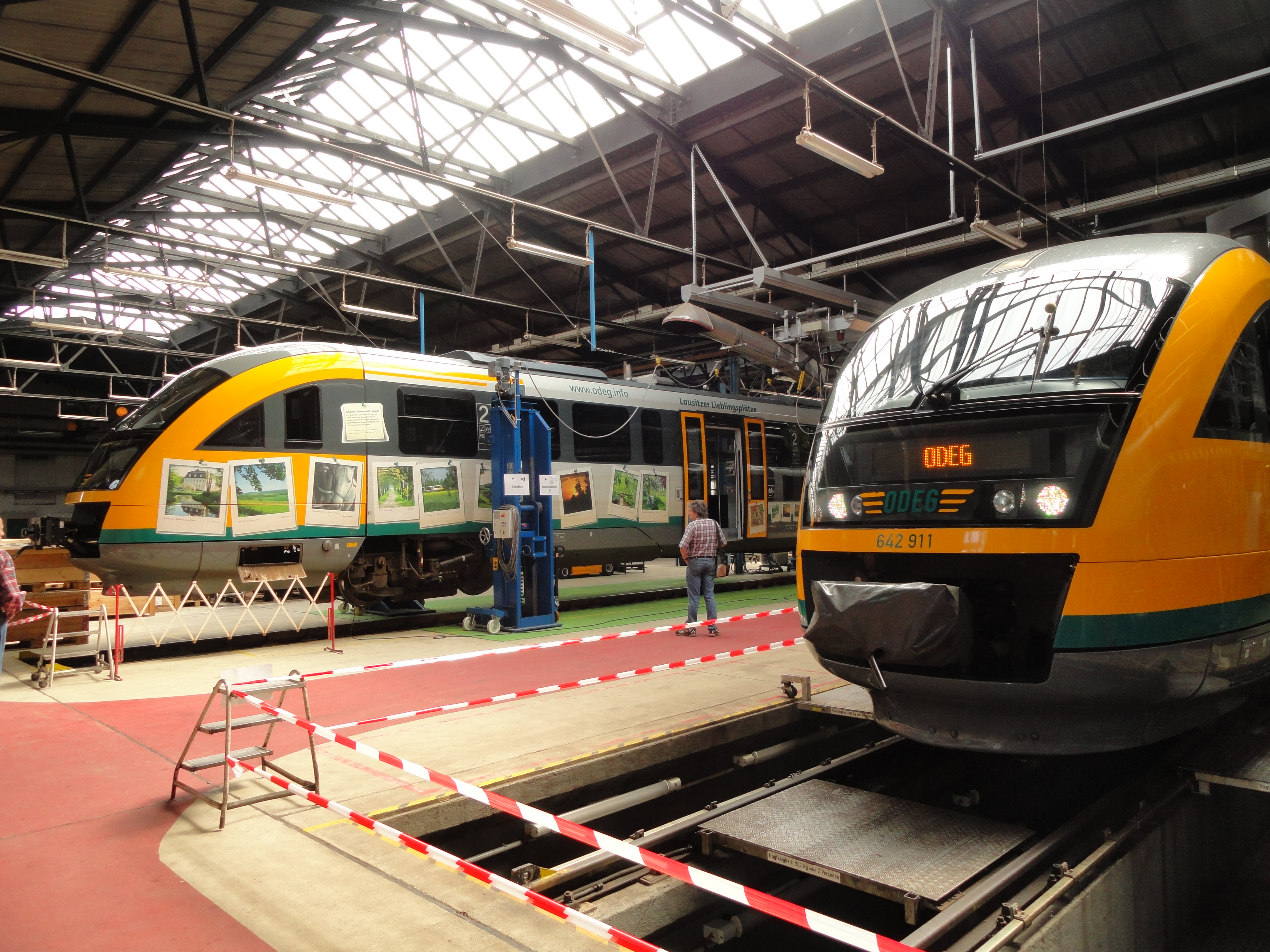 Zwei Siemens Desiro im Bahnbetriebswerk Görlitz